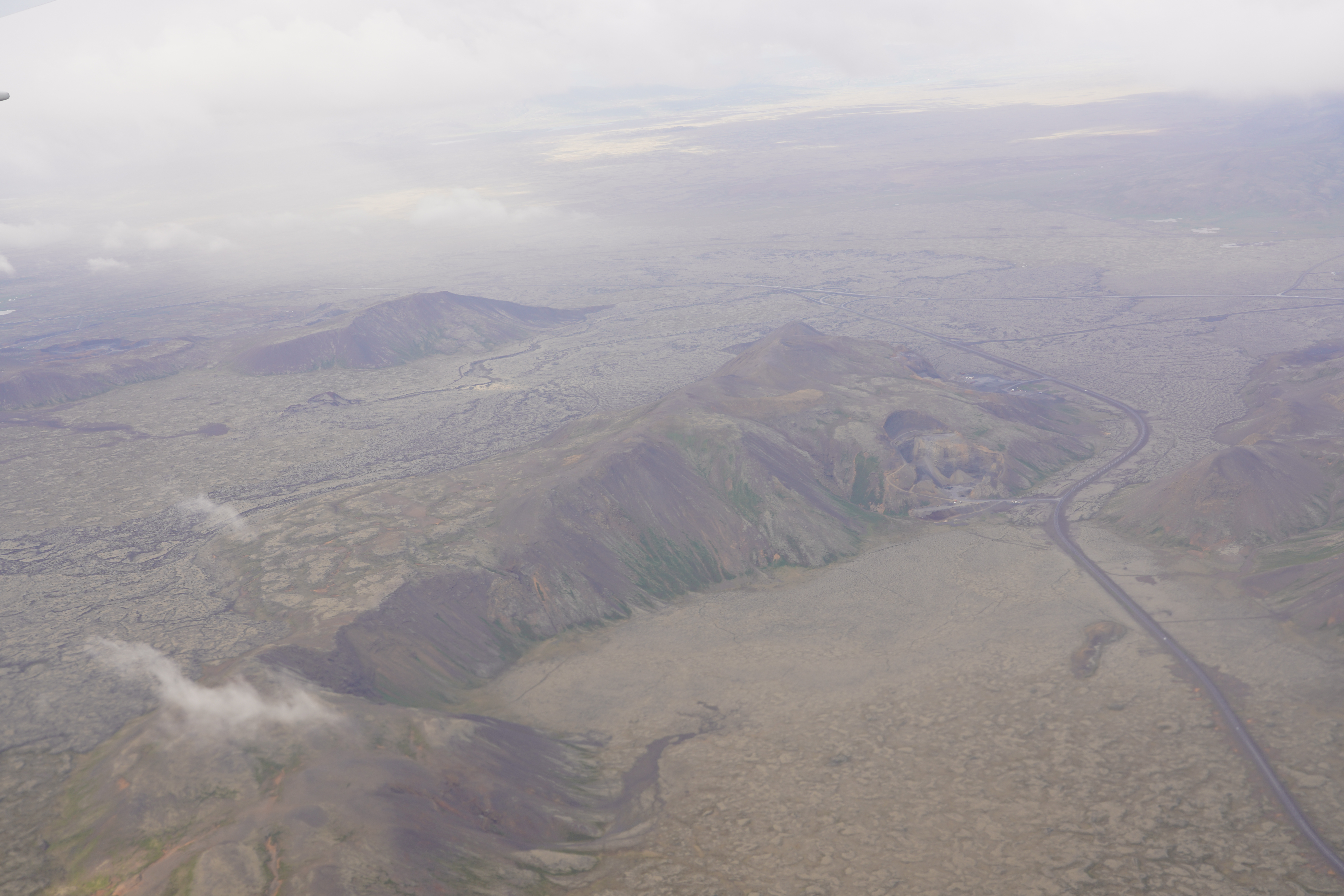 Icelandic aerial-view